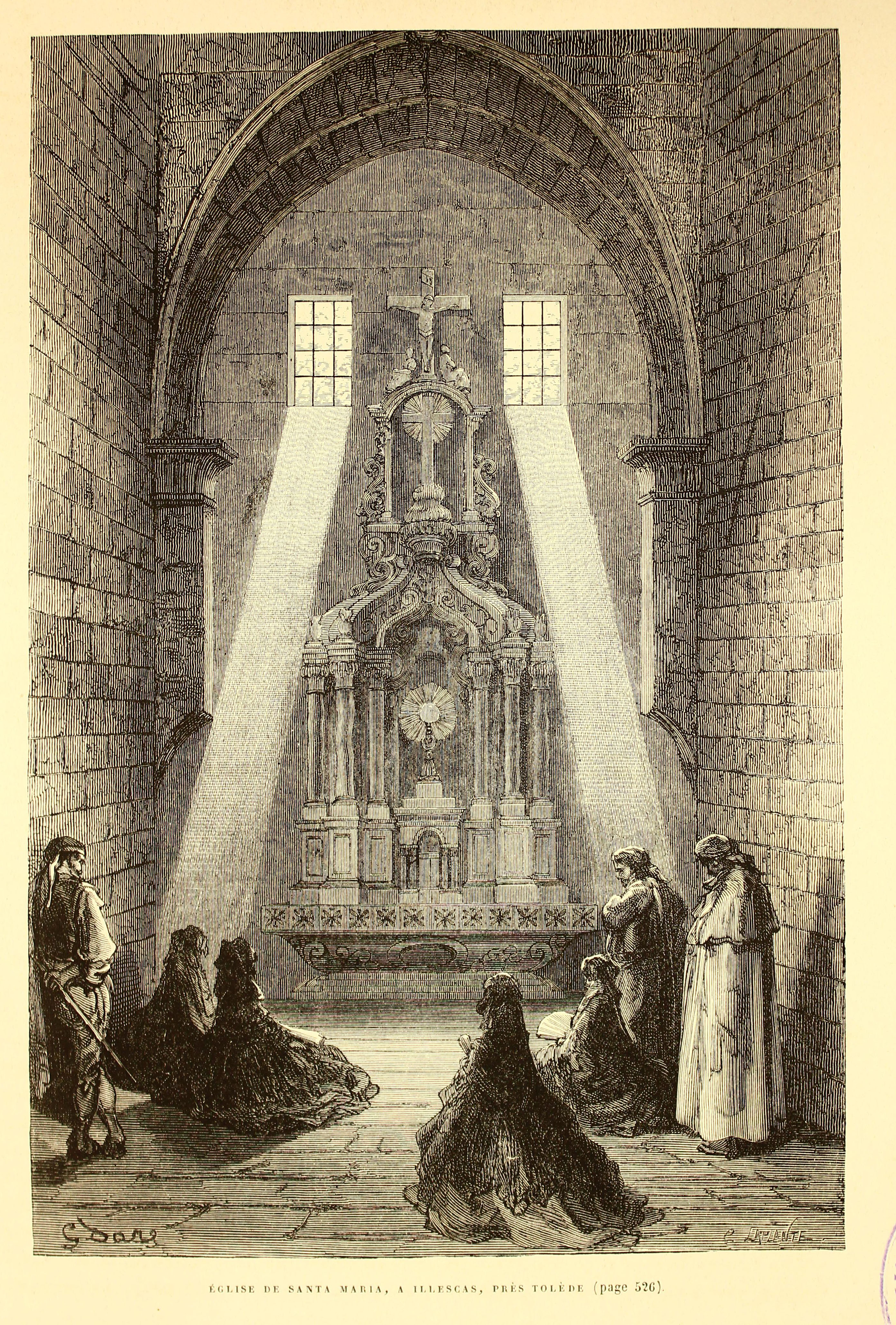 Autor: Davillier, Jean Charles, barón, 1823-1883 Descripción bibliográfica: L'Espagne / par Le Baron CH. Davillier ; ilustrée de 309 gravures dessinées su bois par Gustave Doré. - Paris : Librairie Hachette, 1874. - 799 p. : il. Materia: España- Geografía Materia: España- Usos y costumbres Ilustrador: Doré, Gustave, 1832-1883 Editor: Libreria Hachette Lugar de impresión: Francia, París Localización: Libro completo